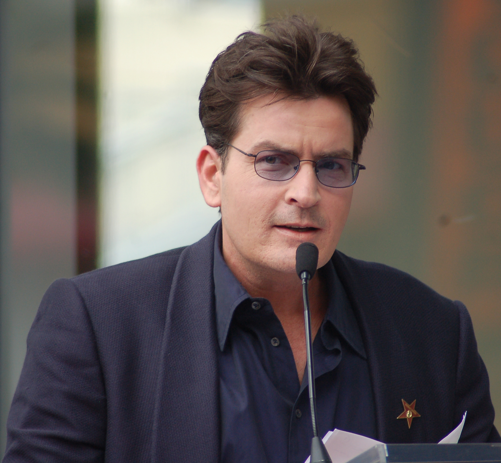 Charlie Sheen in March 2009